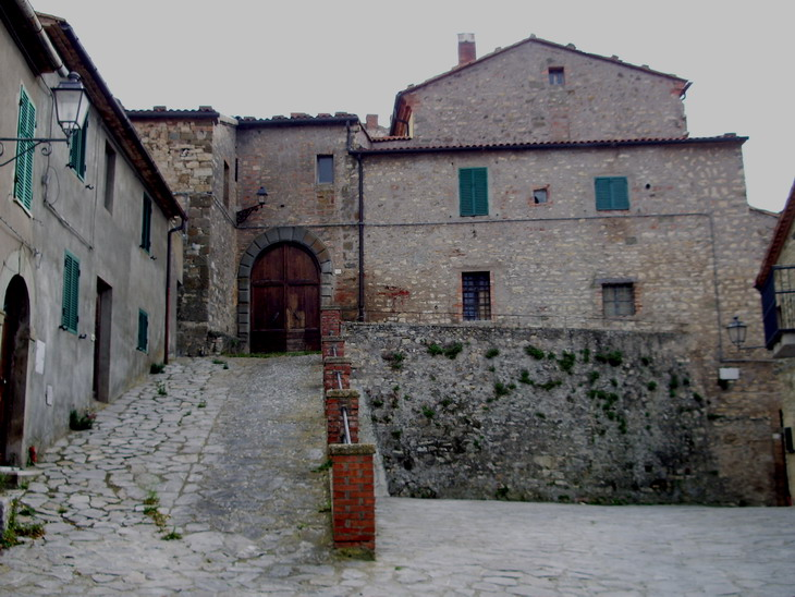 Piazza presso il castello di Castiglioncello Bandini (GR)